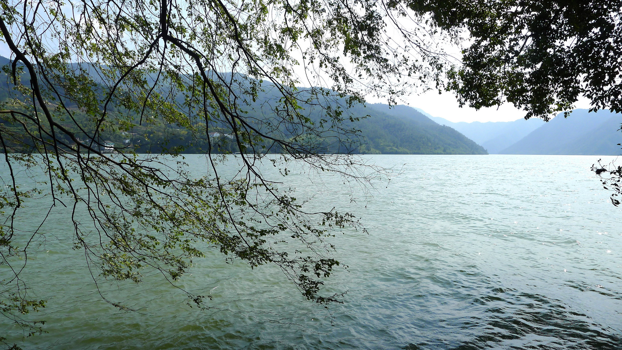 桐庐富春江